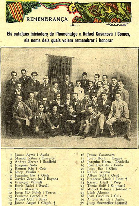 Detenidos por el homenaje a Rafael Casanova en 1901